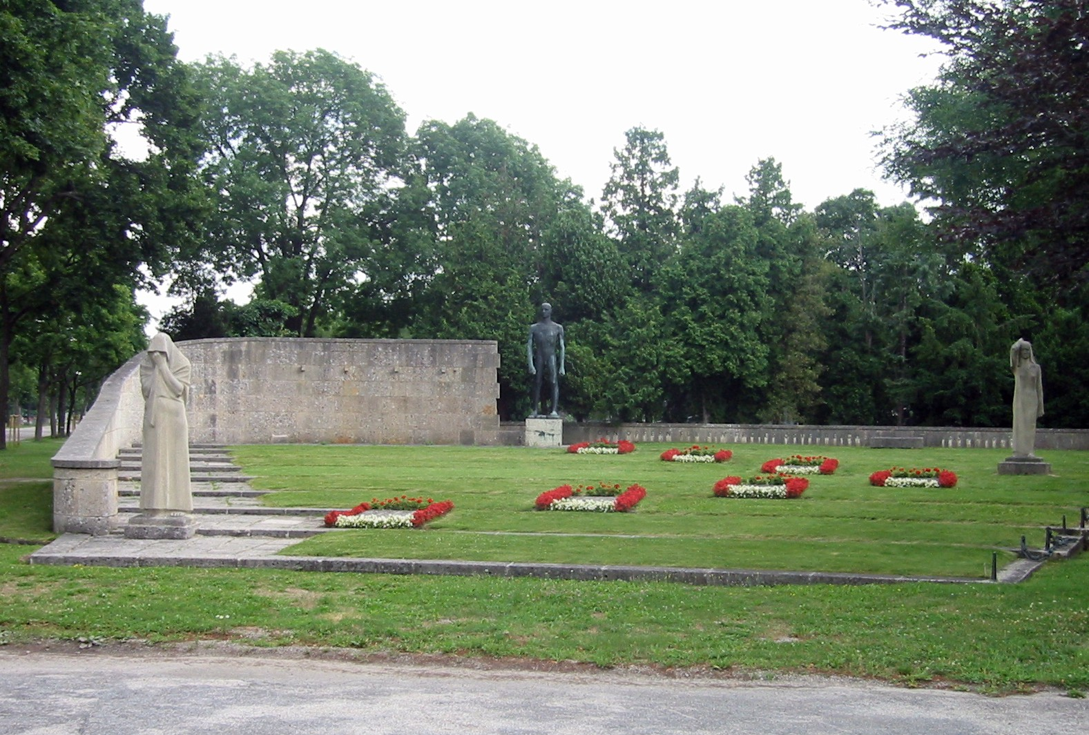 Wiener Zentralfriedhof, Mahnmal für die Opfer des Faschismus 1934–1945